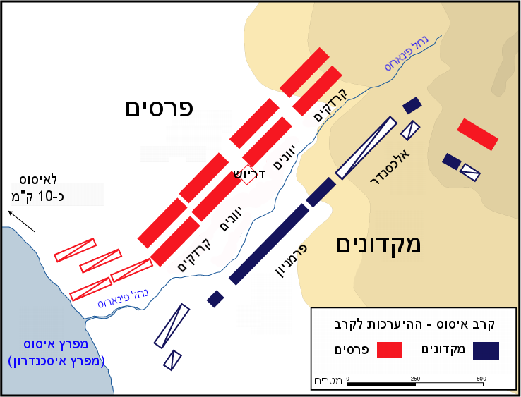 קרב איסוס - שלב התחלתי